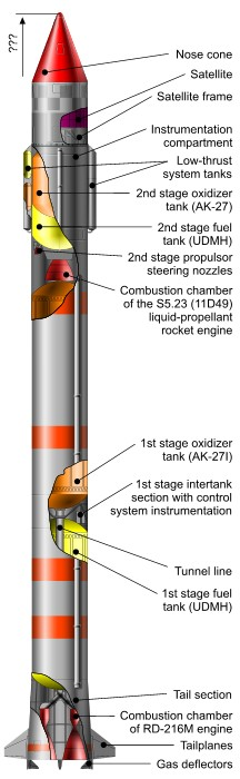 Infografia de la lanzadera Kosmos-3M